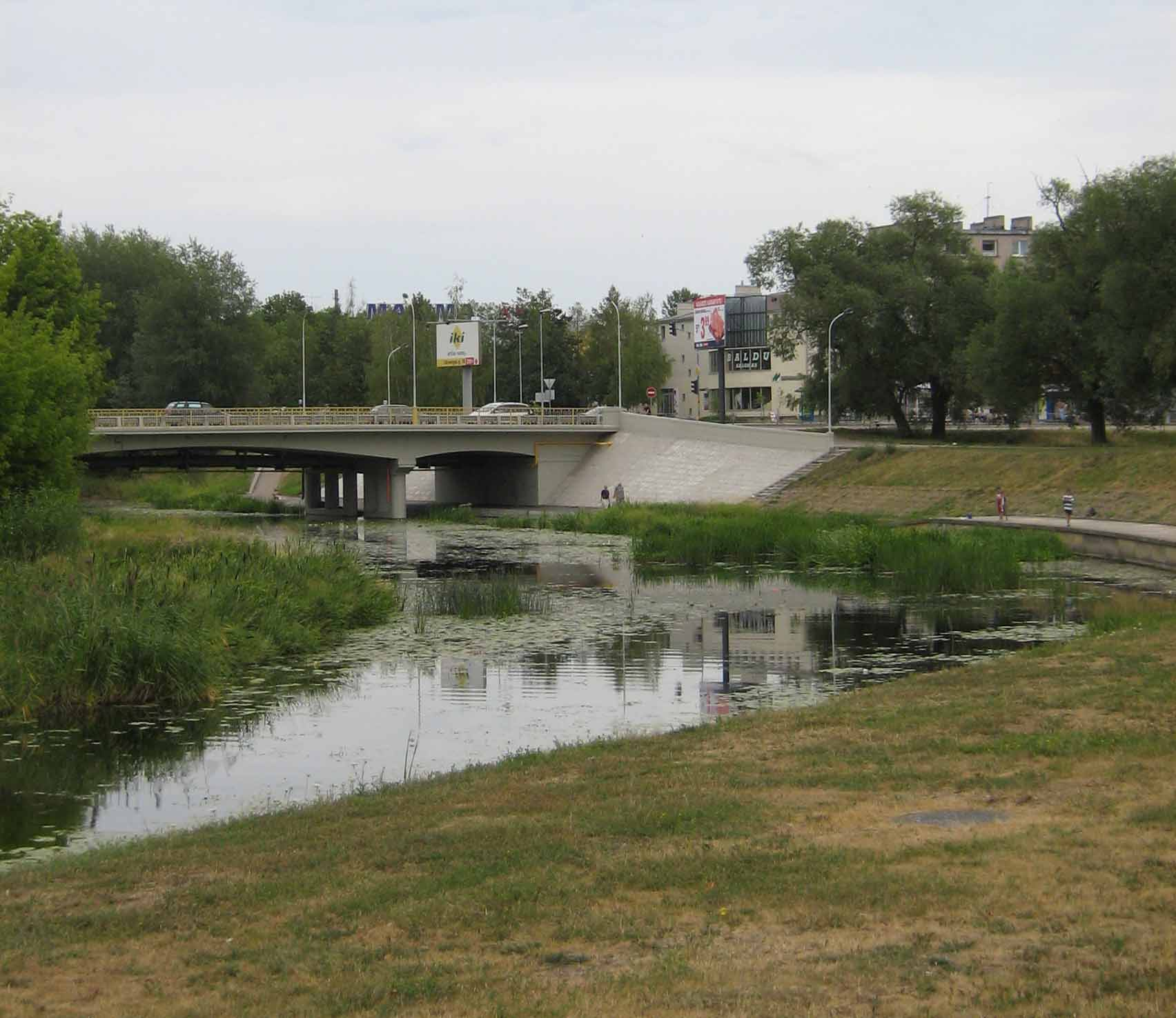 Nevezis river in Panevežys